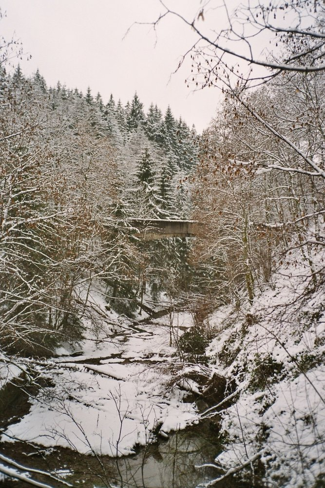 Der Aquädukt (Krenkelsbachaquädukt) am Heinsberger Tunnel